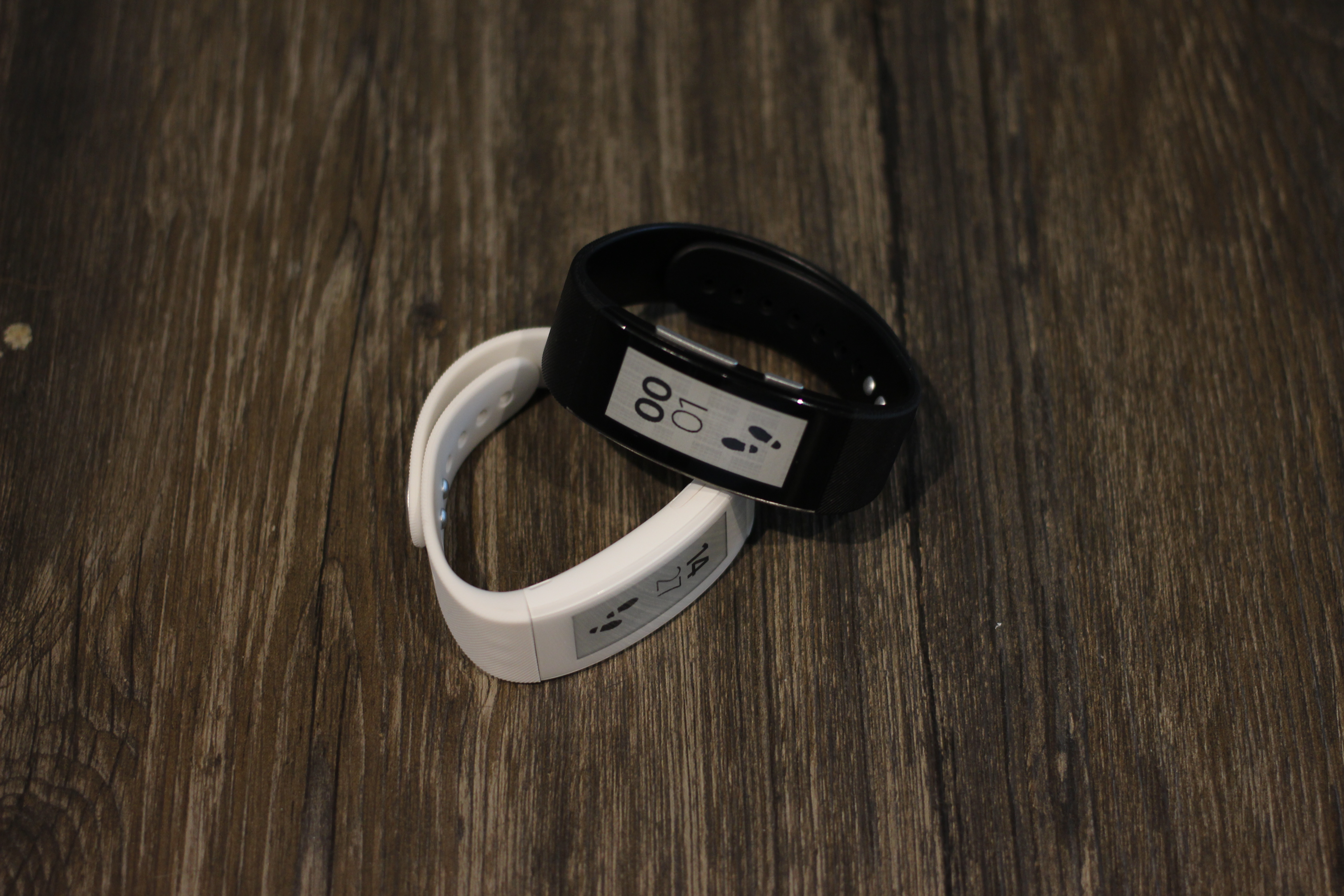 Sony SmartBand Talk